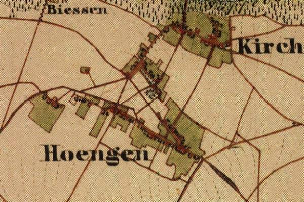 Preußische Kartenaufnahme 1846 - Uraufnahme